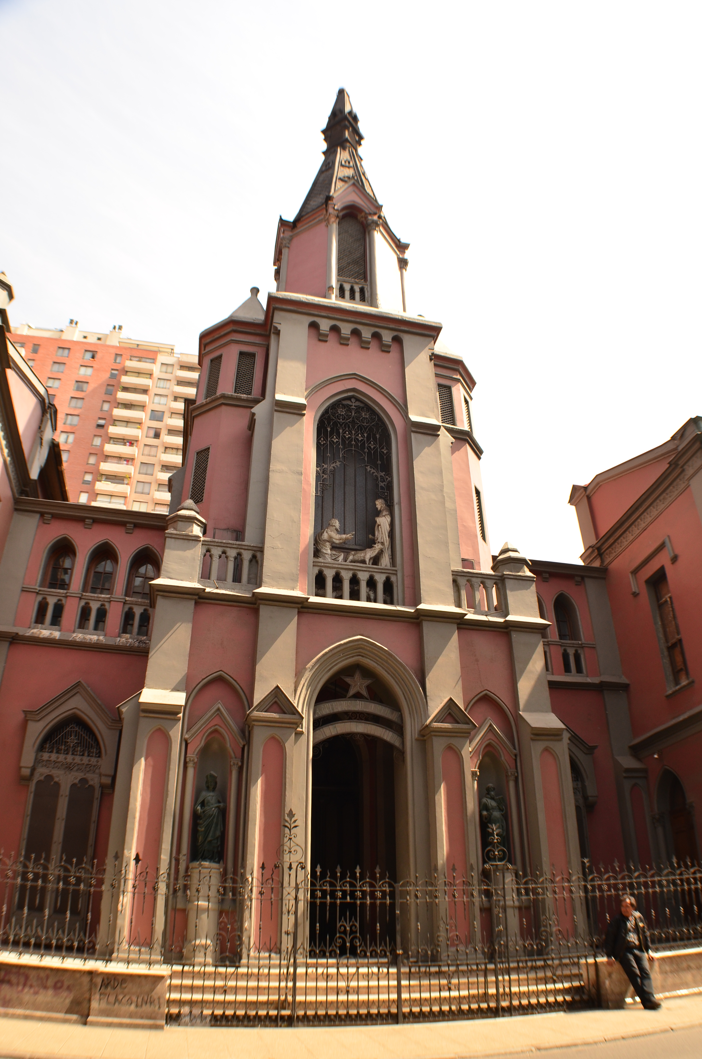 Iglesia San Pedro This is a photo of a national monument in Chile: 875